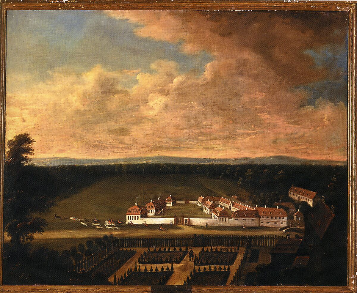 Ansicht des Jagdschlosses Mönchbruch, 18. Jahrhundert